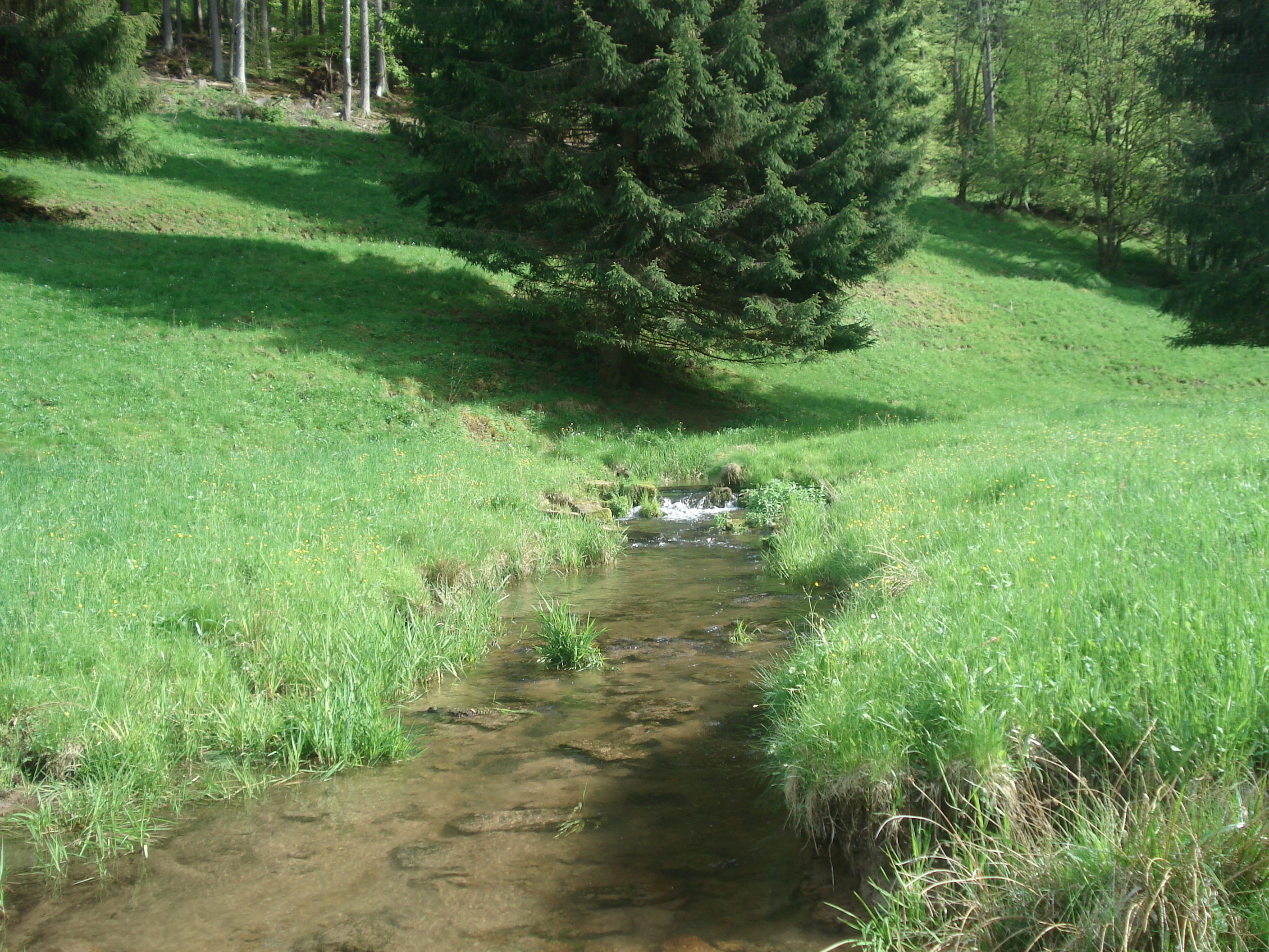 Der Steinbach unterhalb der Steinmühle